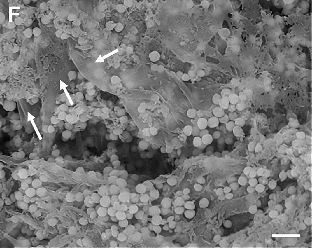 Fig. 3. Microscopía electrónica de barrido de biopelículas. F) S. aureus Newbould 305 (NB305), cultivado en caldo BHI sobre cubreobjetos de vidrio redondo en placas de 24 pocillos a 37Template:Esd°C durante 48 h (NB305) a 72 h (D153). Las biopelículas cultivadas en cubreobjetos de vidrio se fijaron con soluciones fijas de metacarn durante 48 hy las muestras se procesaron para el examen SEM. Las capas de EPS en la parte superior, en el medio y en la parte inferior de las biopelículas se muestran con flechas blancas. Barra de escala= 4 μm; aumento de 5,000).